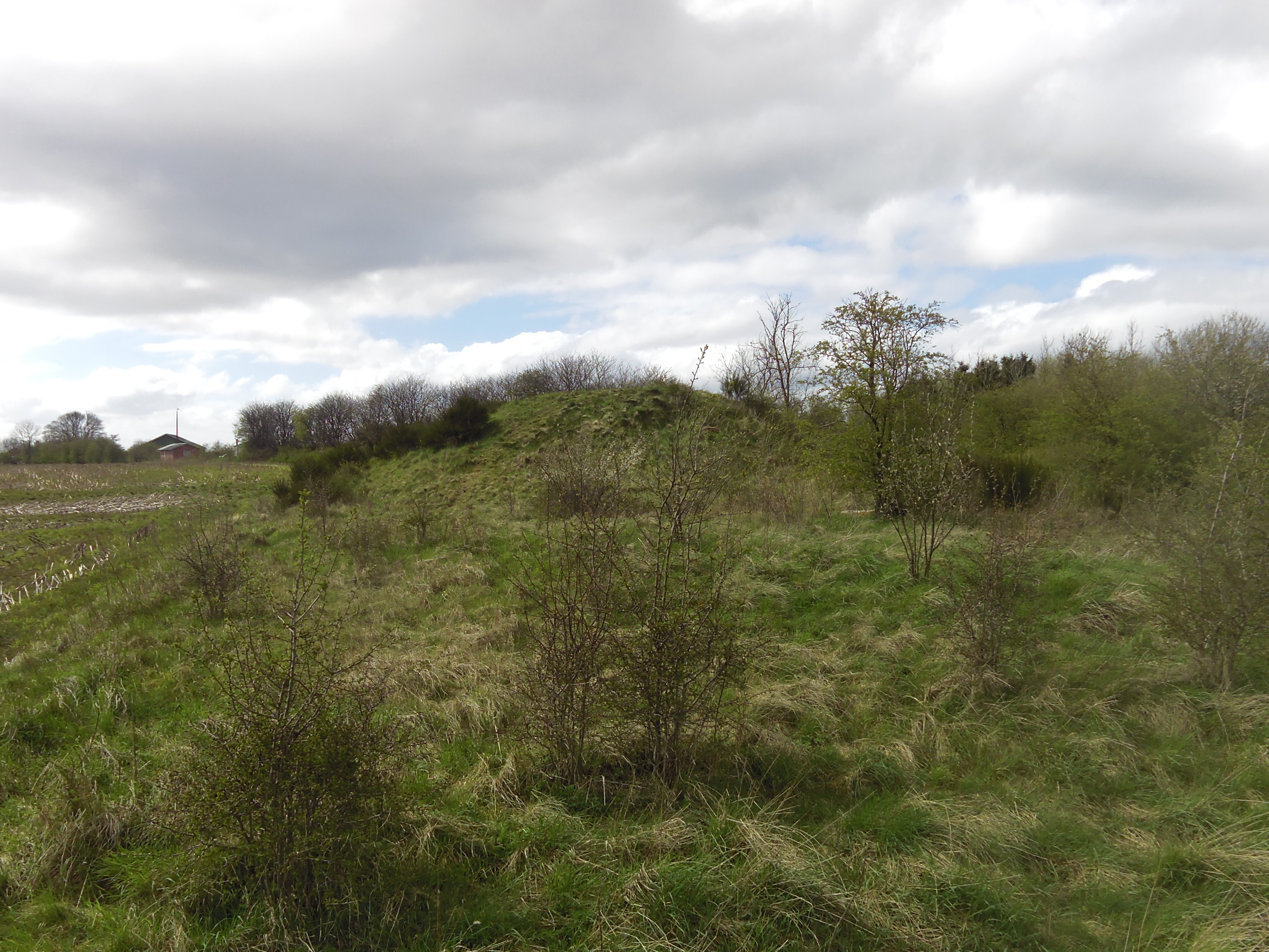 Skrydstruppigens høj